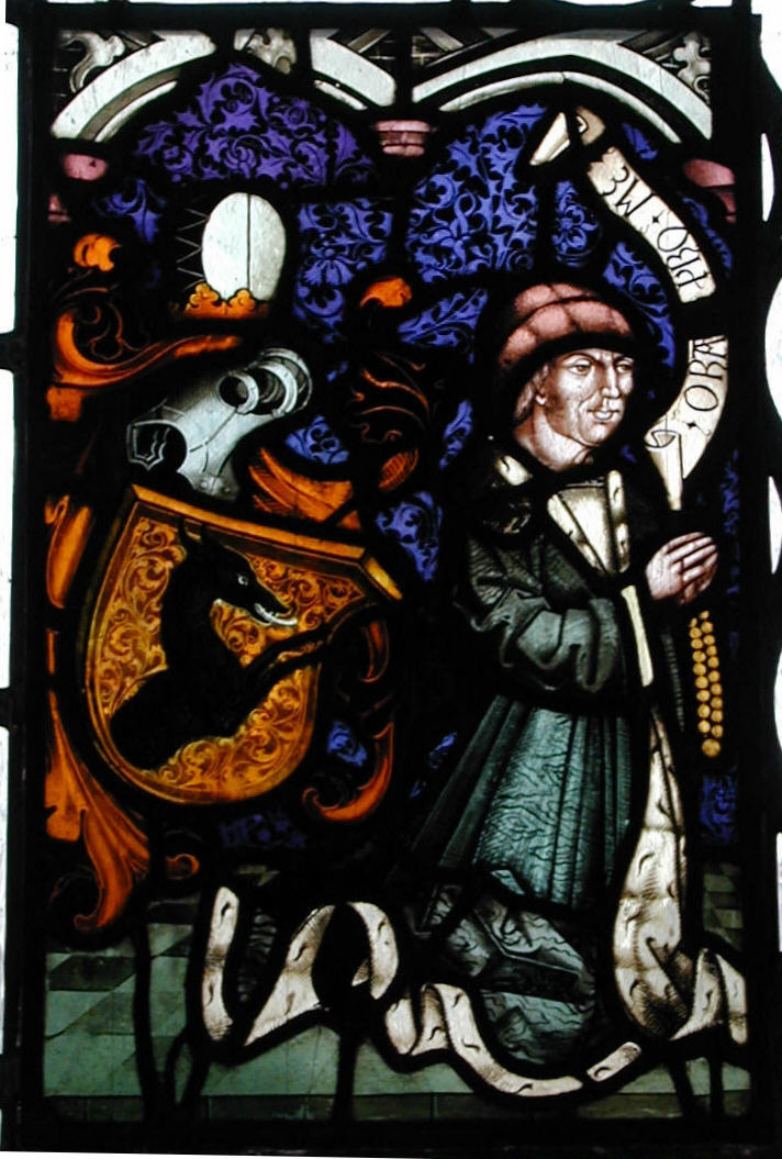 Glasfenster in der Kirche von Salmanskirchen bei Ampfing in Bayern (Deutschland) mit einem Bildnis Genteflor Pfäffingers mit dem Rüdenwappen. Glasmalerei. Ursprünglich in der Schloßkapelle eingebaut, von dieser anläßlich deren Demolierung in die Dorfkirche "Zu den beiden Johannes" übertragen.